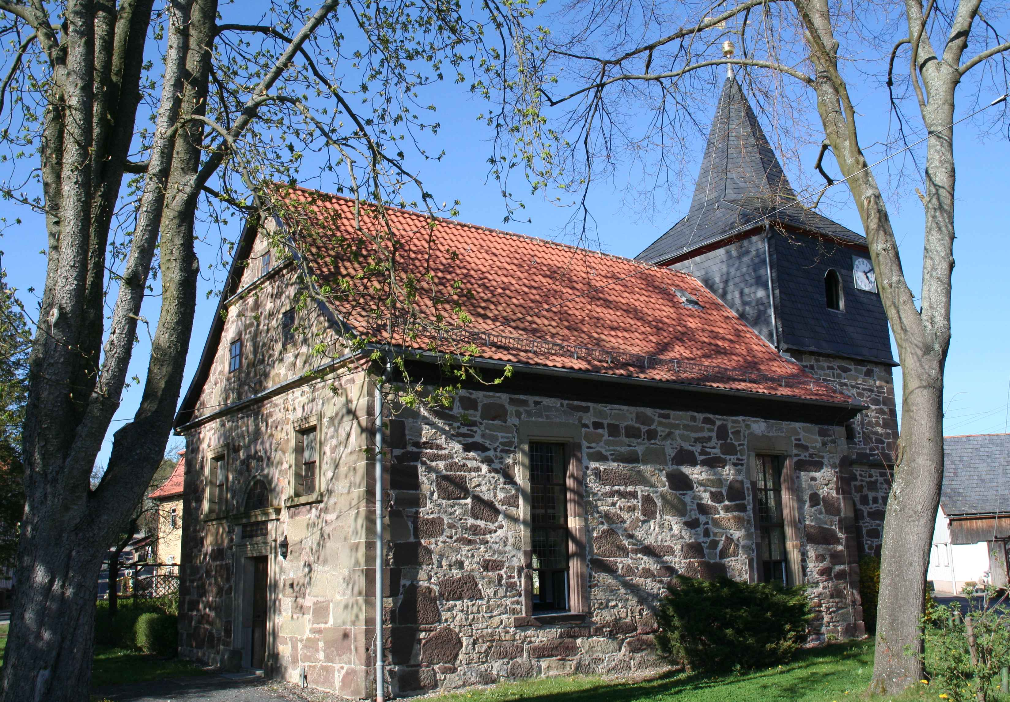 evangelische Kirche in Adelhausen, Gemeinde Straufhain, Landkreis Hildburghausen